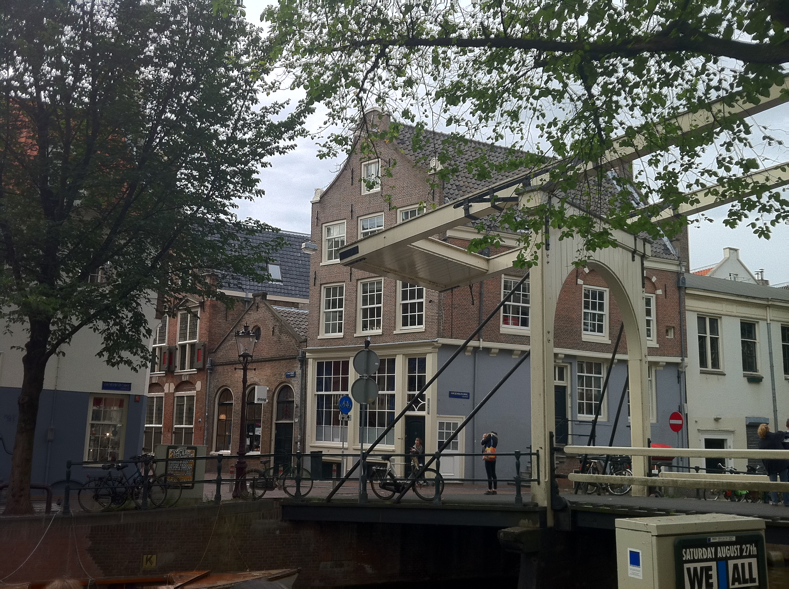 Hoek Staalstraat-Groenburgwal (NW). Staalstraat 9, verhuurd door woningcorporatie Ymere. Hoekhuis waarvan de overgebouwde zijgevel versierd is met kleine boogblokjes.